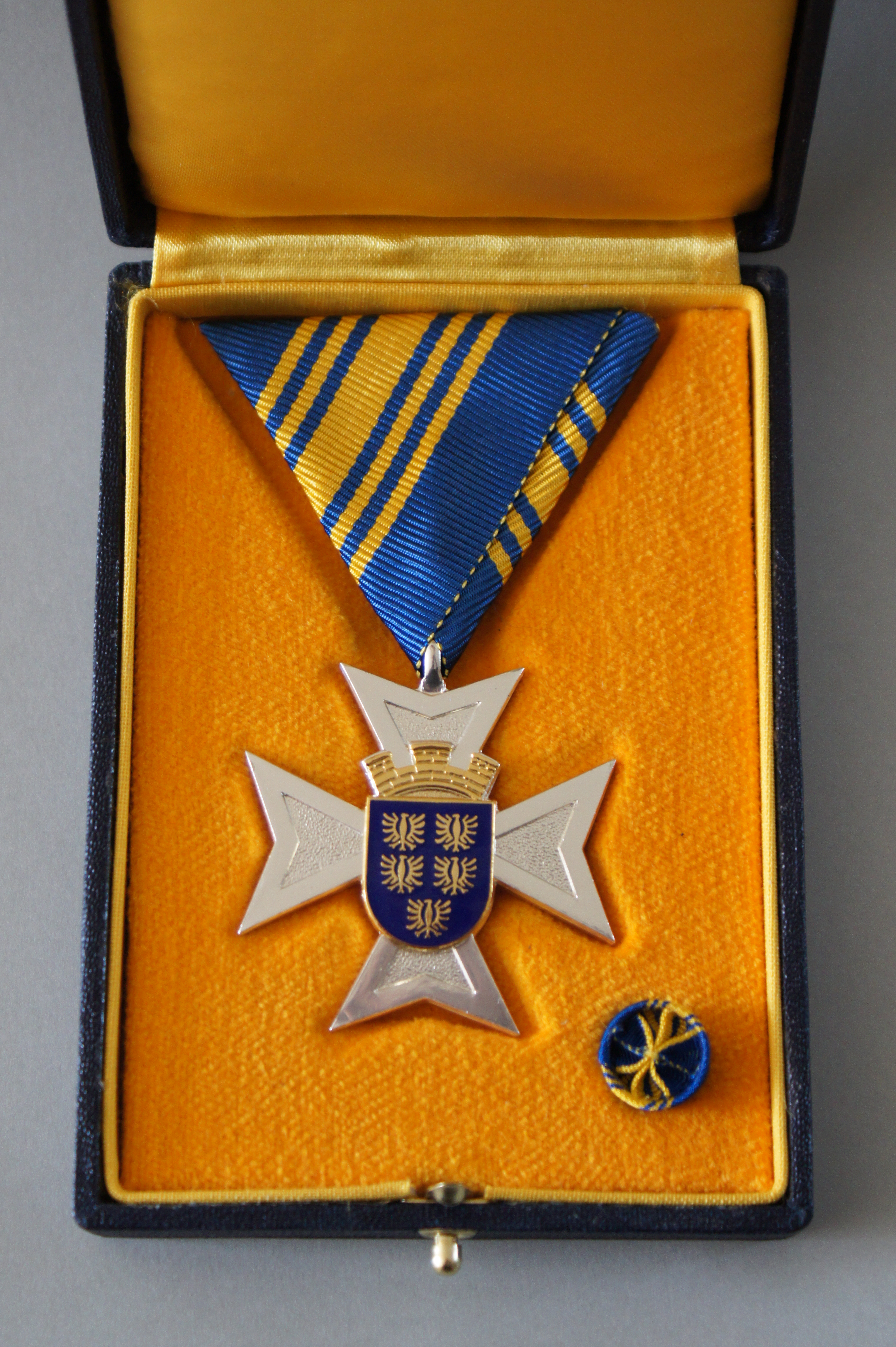 Silbernes Ehrenzeichen für Verdienste um das Bundesland Niederösterreich, Verliehen im Juni 2011 an Helmut Wolfger